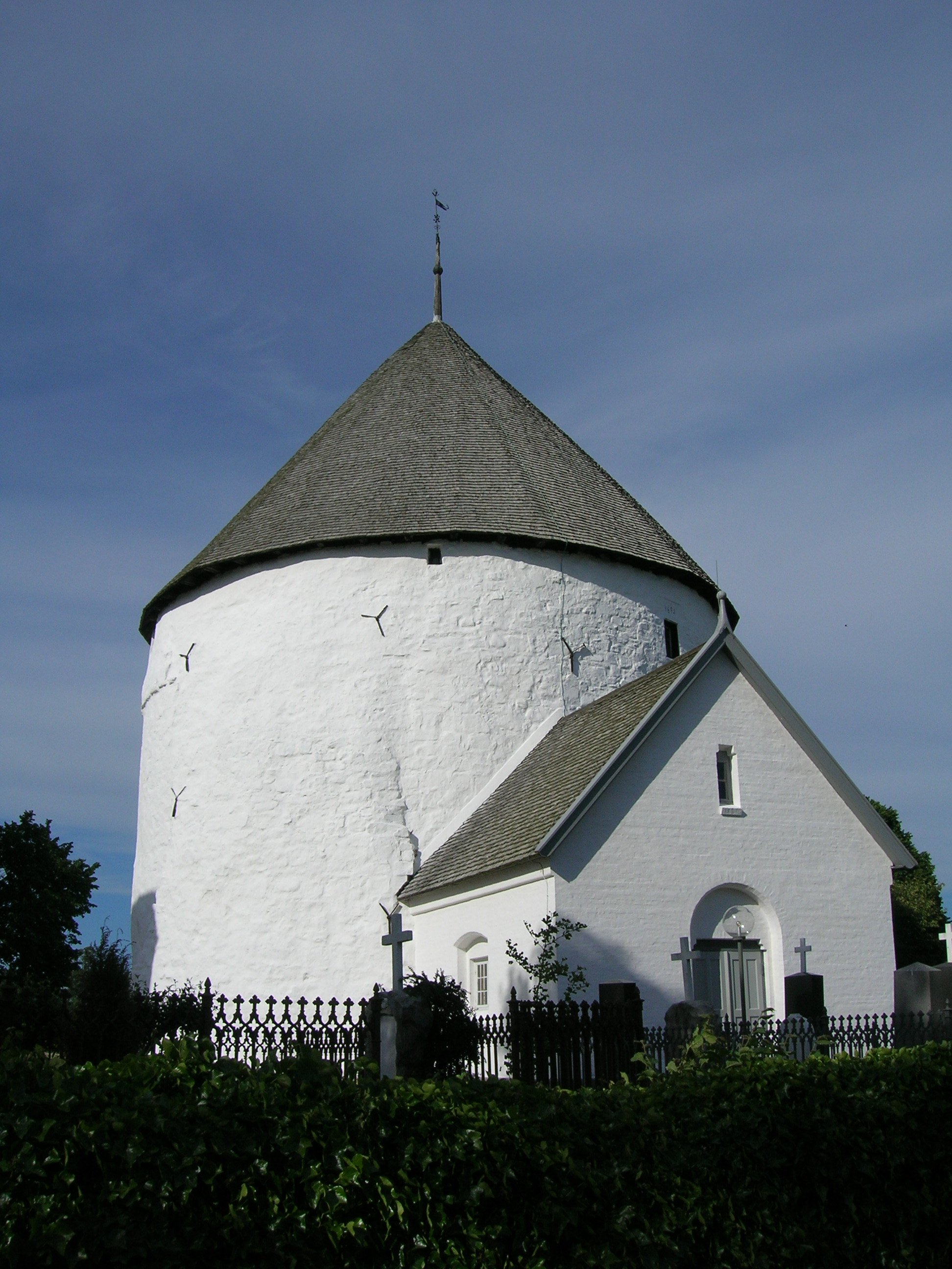 Nylars Rundkirke - 2005